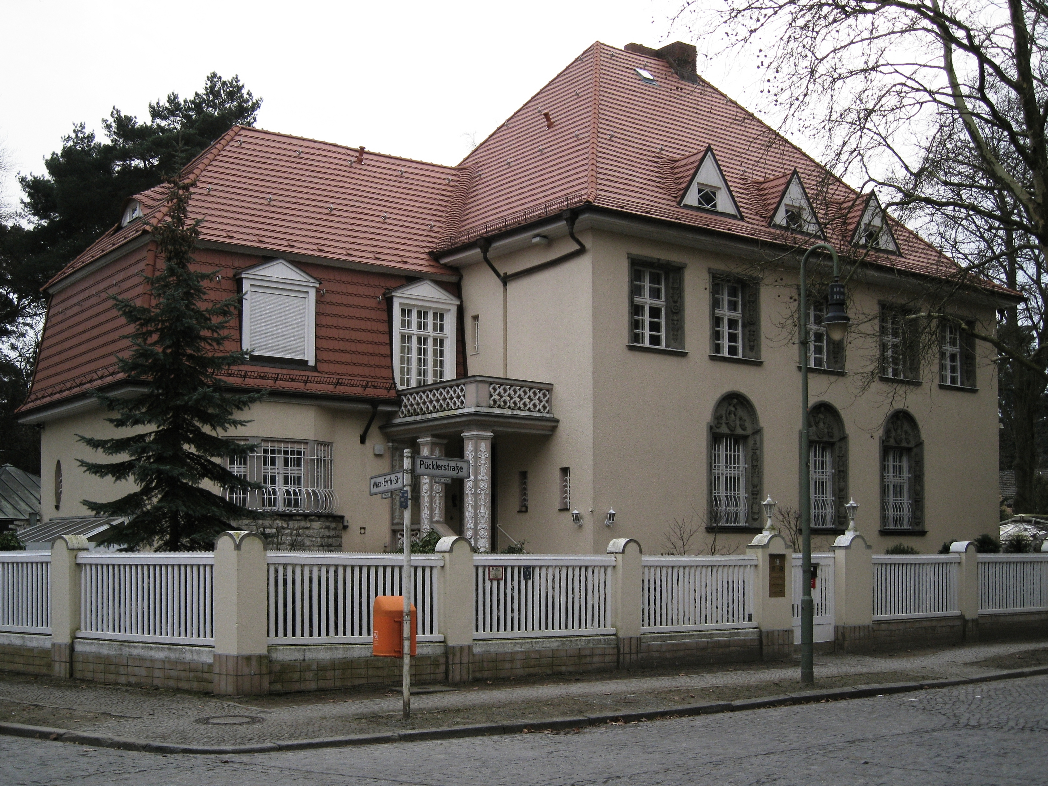 Wohnhaus